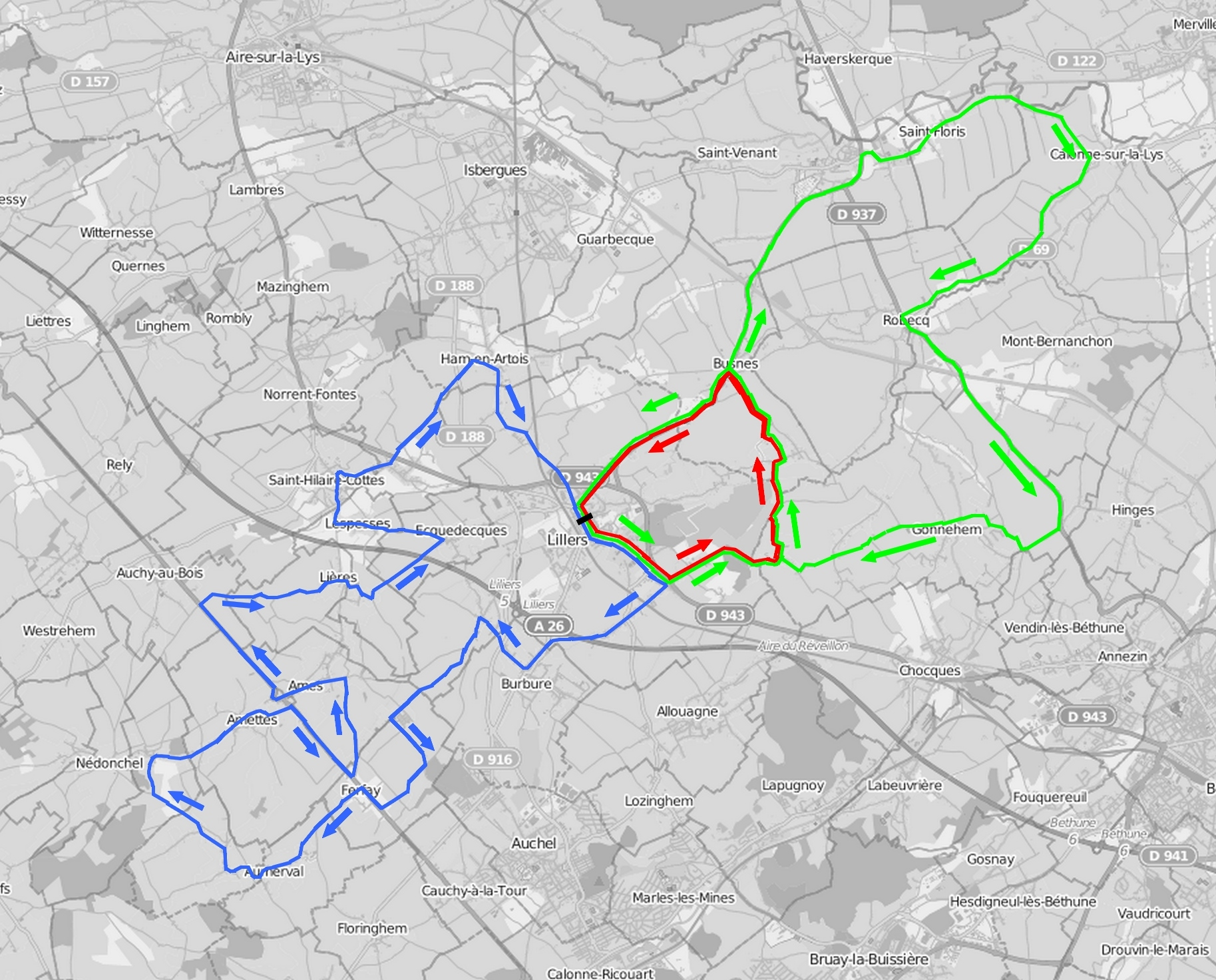 L'édition 2014 du Grand Prix de Lillers-Souvenir Bruno Comini s'est déroulée le dimanche 9 mars 2014, avec pour arrivée et départ la commune de Lillers, Pas-de-Calais, Nord-Pas-de-Calais, France. This map may be incomplete, and may contain errors. Don't rely solely on it for navigation.